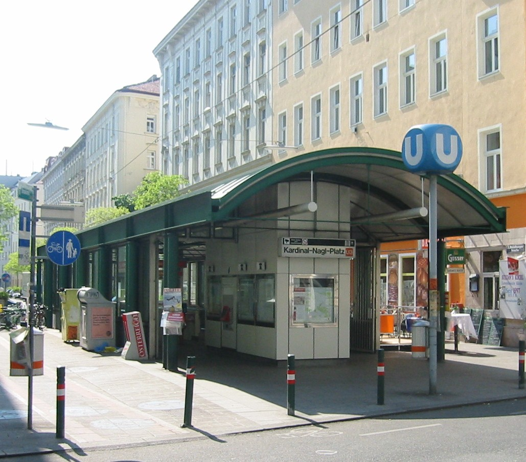 Wien U3 Kardinal-Nagl-Platz